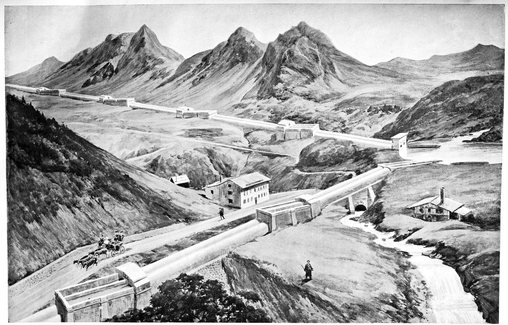 Der Italienische Ingenieur Pietro Caminada hat einen Schifffahrtsweg über die Alpen geplant - mit geneigten Röhrenkanälen. Die Zeichnung visualisiert einen Abschnitt beim Splügenpass.